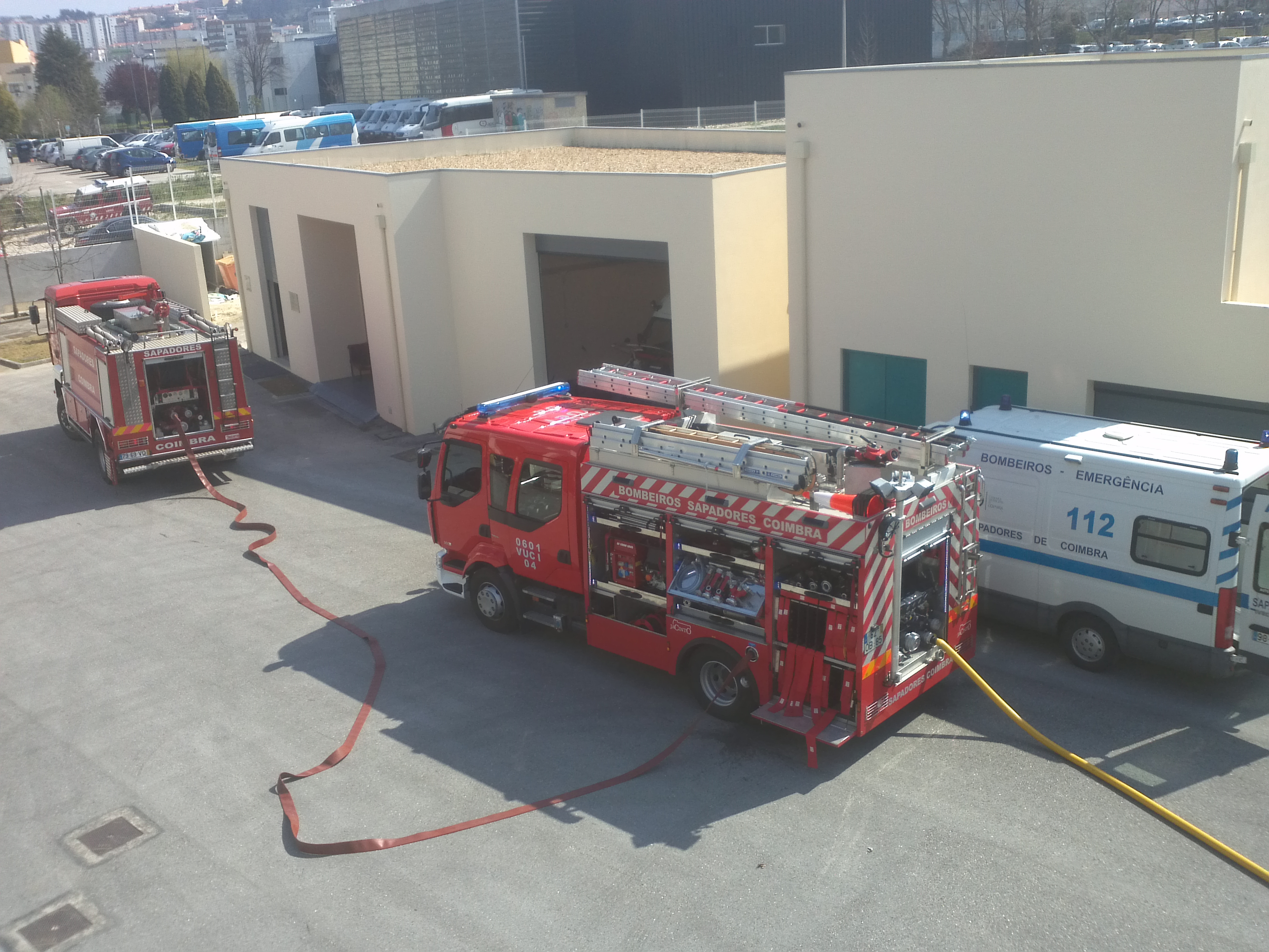 SIMULACRO02